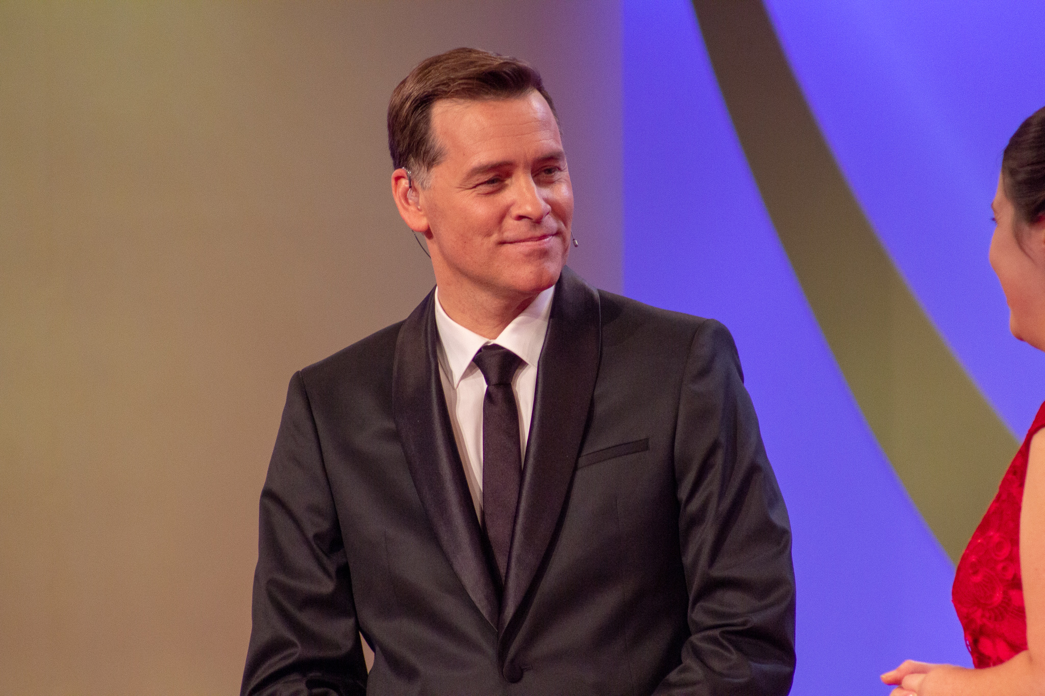 Wahl der 70. Deutschen Weinkönigin Carolin Klöckner am 28. September 2018 im Saalbau in Neustadt an der Weinstraße. Ehrengäste waren u.a. Julia Klöckner, (Bundeslandwirtschaftsministerin und Marc Weigel, Bürgermeister von Neustadt.